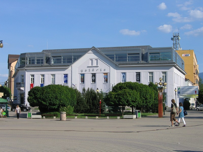 Považská galéria umenia, Žilina (2009)